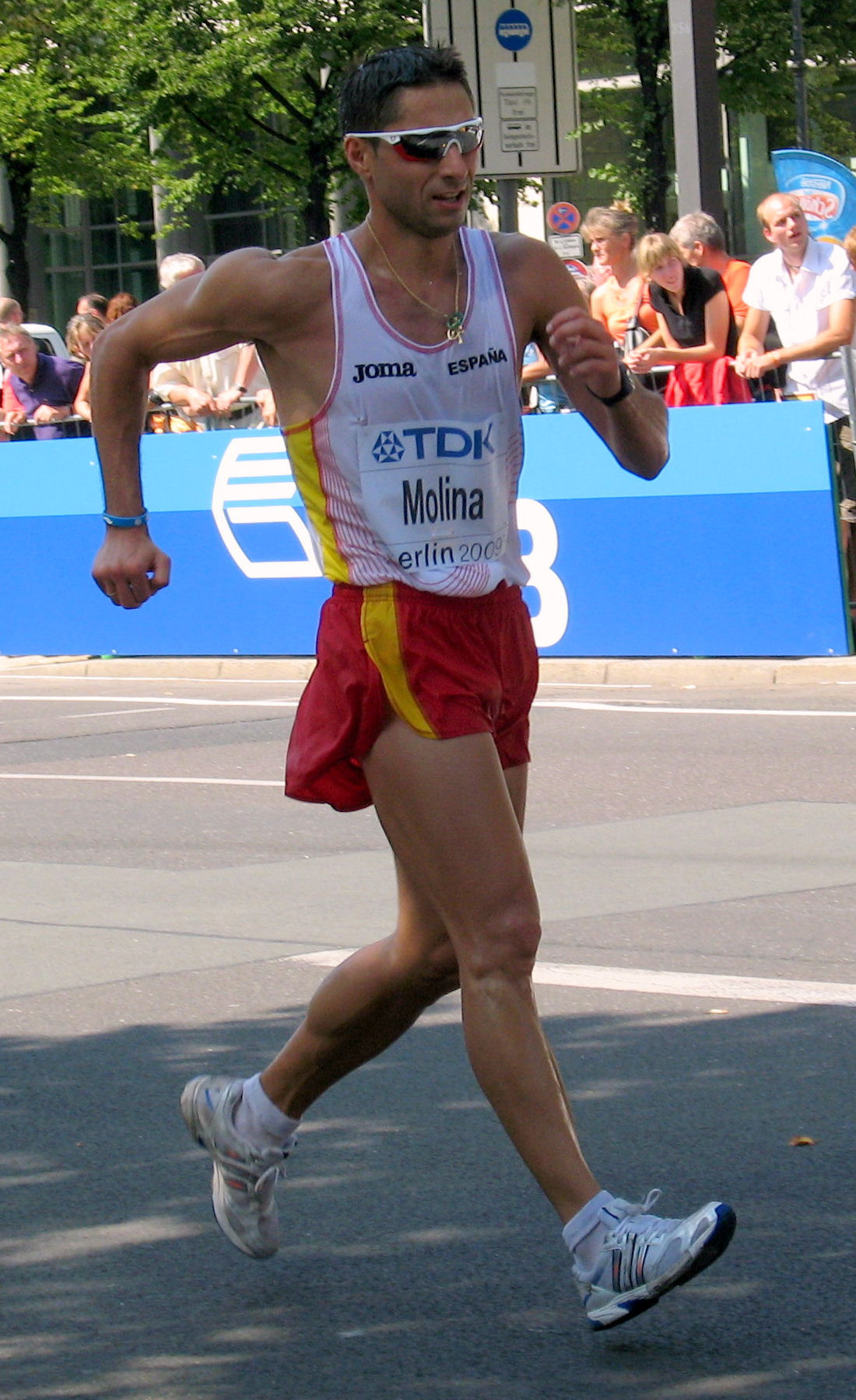 Juan Manuel Molina, 15.08.2009